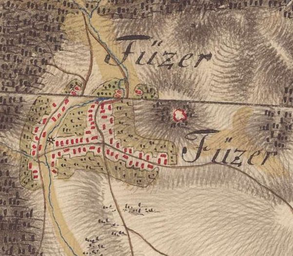 Füzér az első katonai felmérés idején